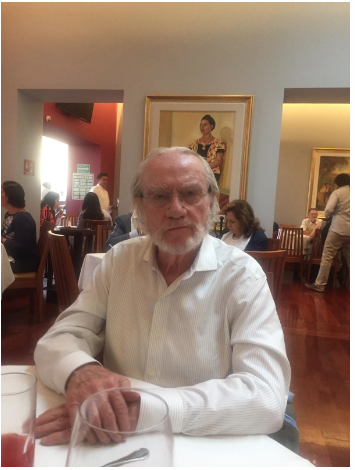 Foto del licenciado Pablo Aveleyra Arroyo de Anda en su último cumpleaños, 2018, en un restaurante de la Ciudad de Méxcio